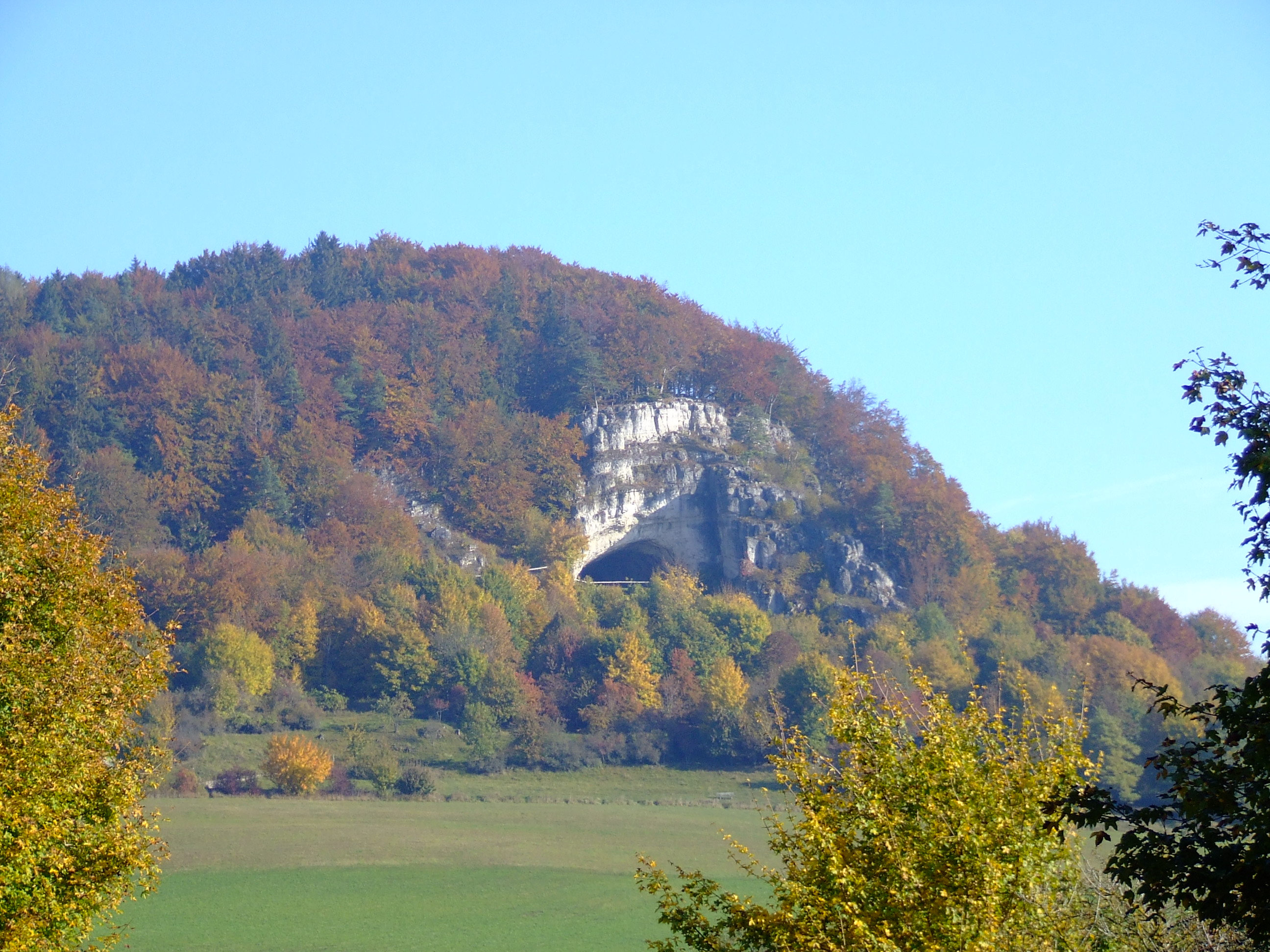 Hohlloch, Grottenkomplex bei Velburg in der Oberpfalz